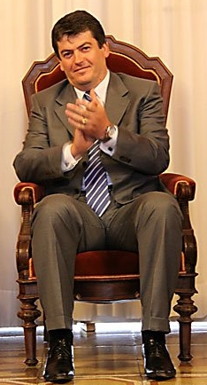 Bamir Topi